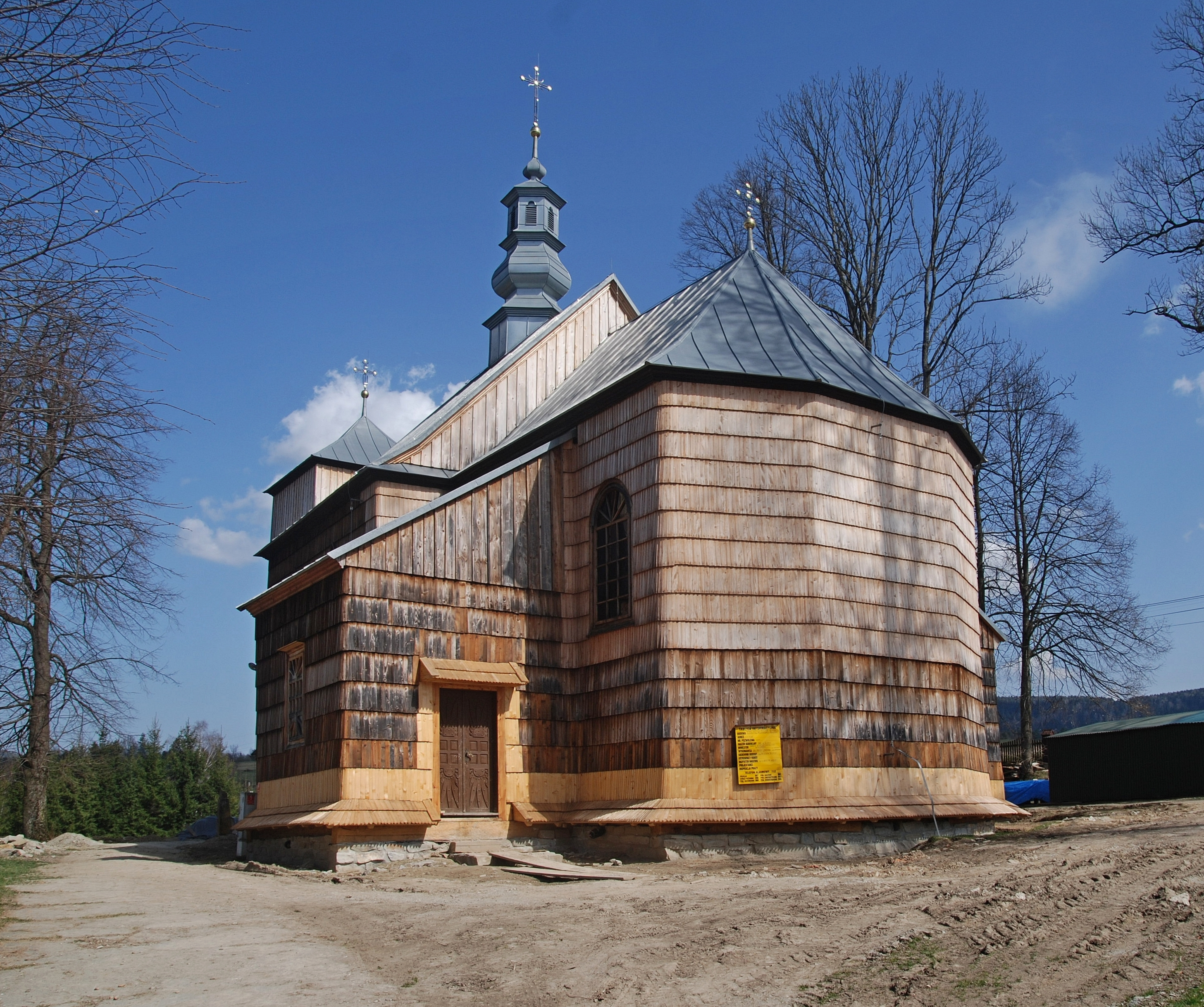 wieś Stefkowa, cerkiew św. Paraskewy Wikidata has entry Q9188049 with data related to this item.